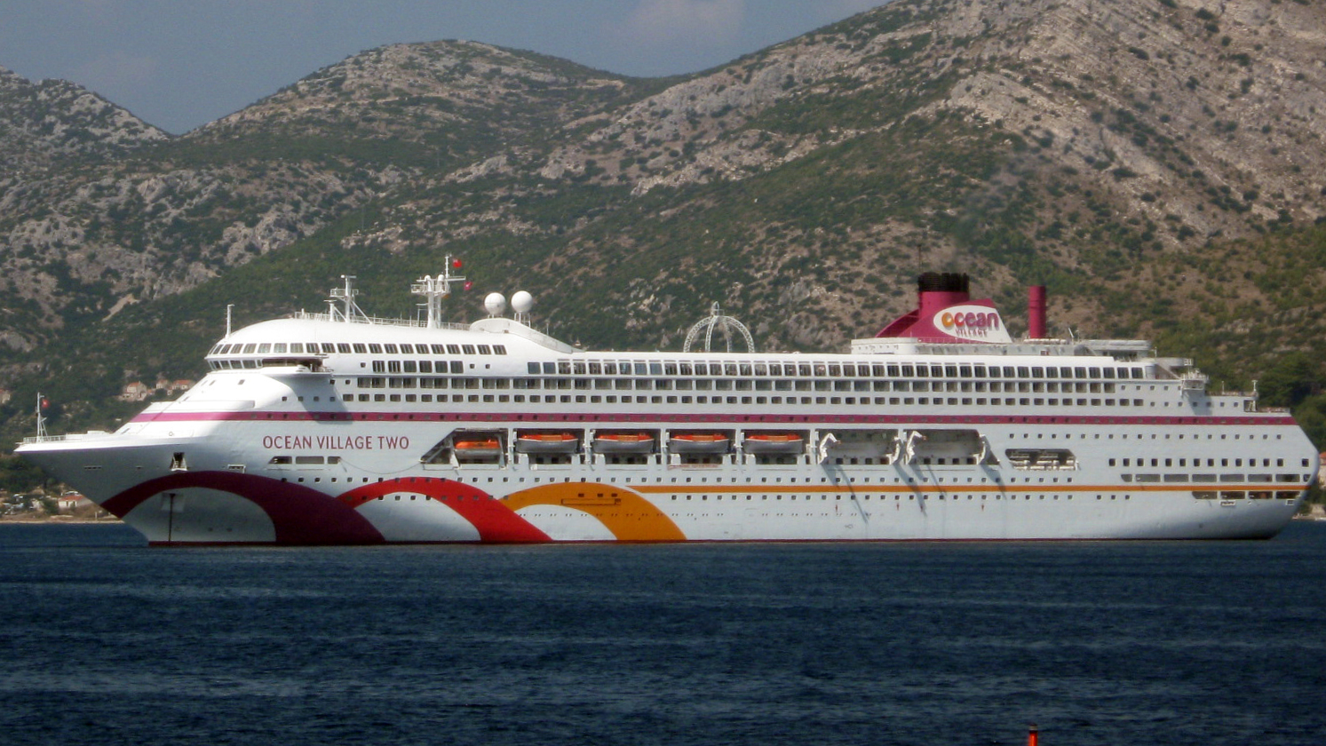 Korčula